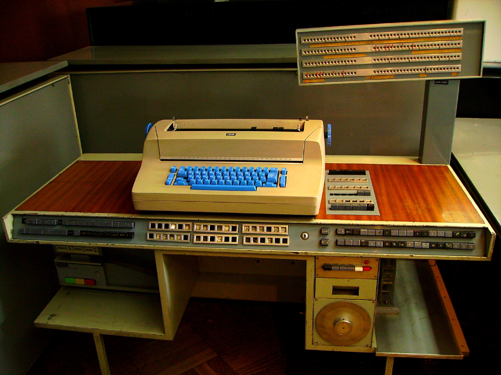 KAR 65, eng. Jacek Karpinski